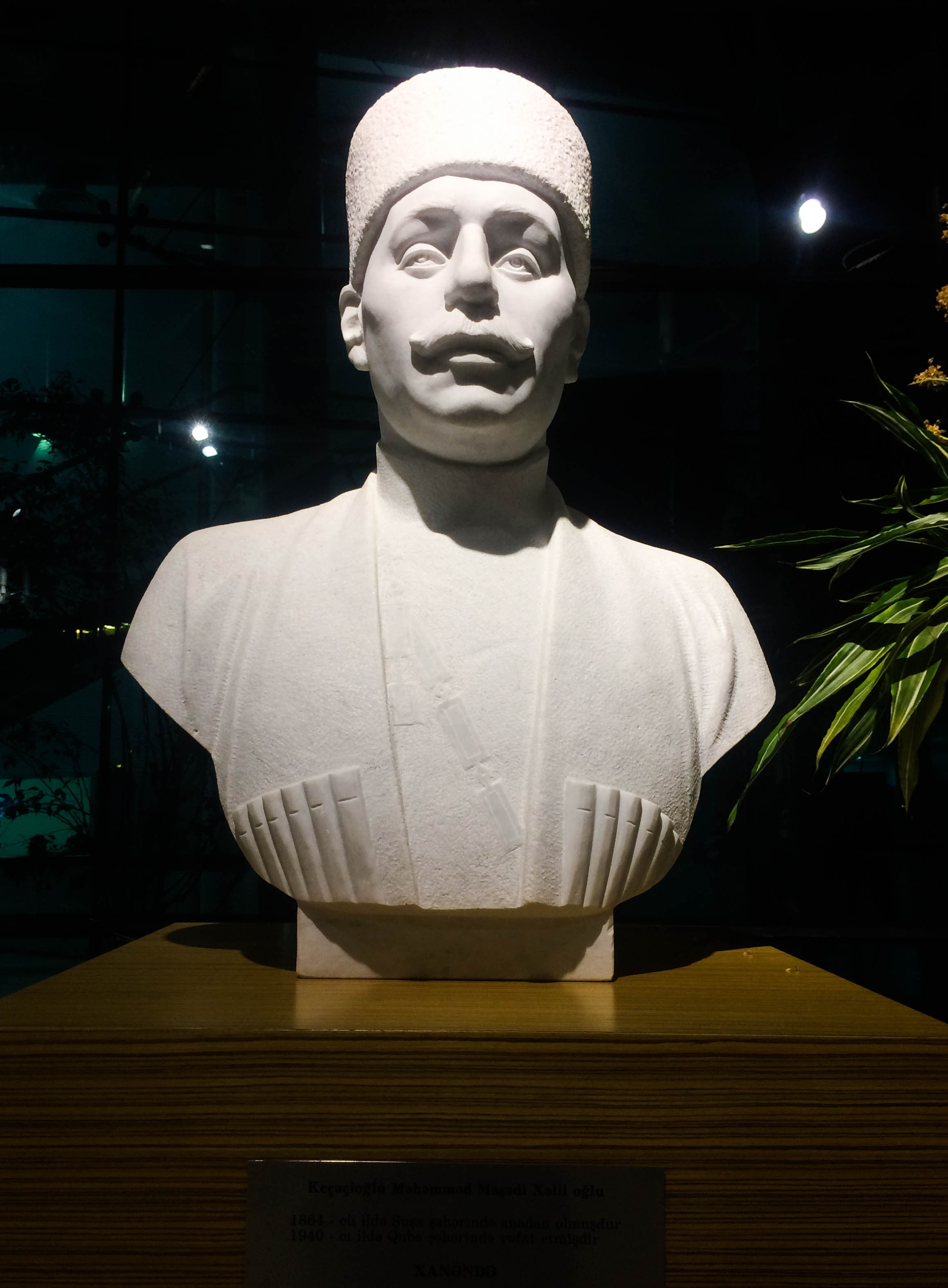 Keçəçioğlu Məhmmədin büstü